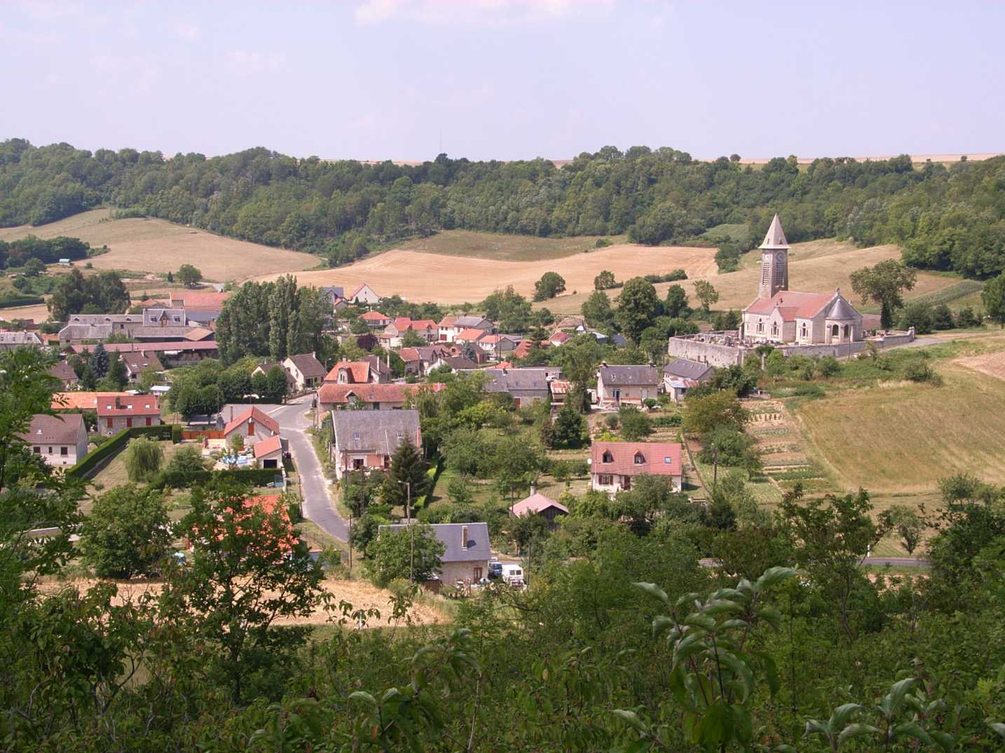 Braye_en_Laonnoise, Chemin des dames